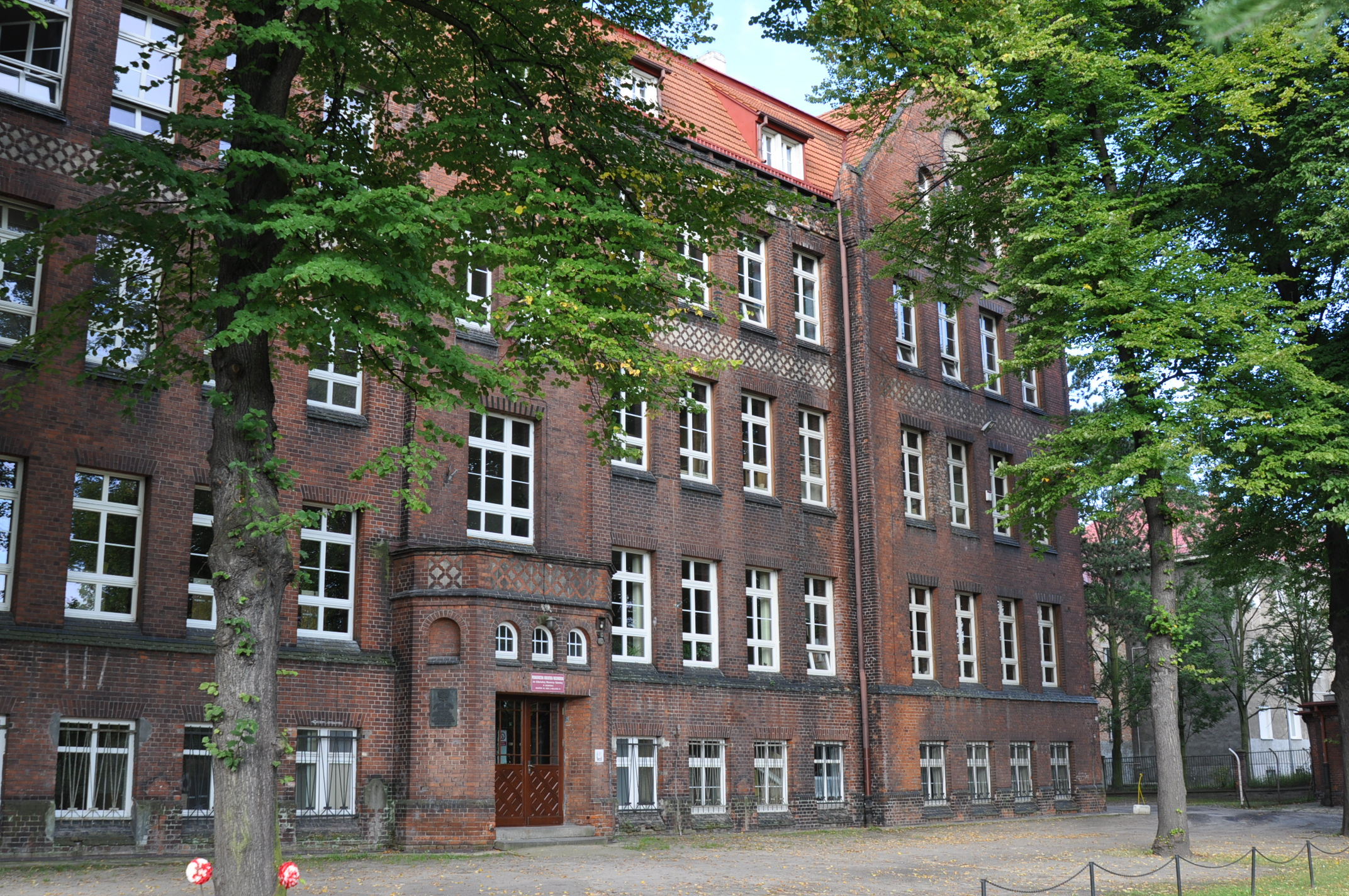 Gdańsk Wrzeszcz, Aleja gen. Józefa Hallera 14 - Budynek Pedagogicznej Biblioteki Wojewódzkiej w Gdańsku